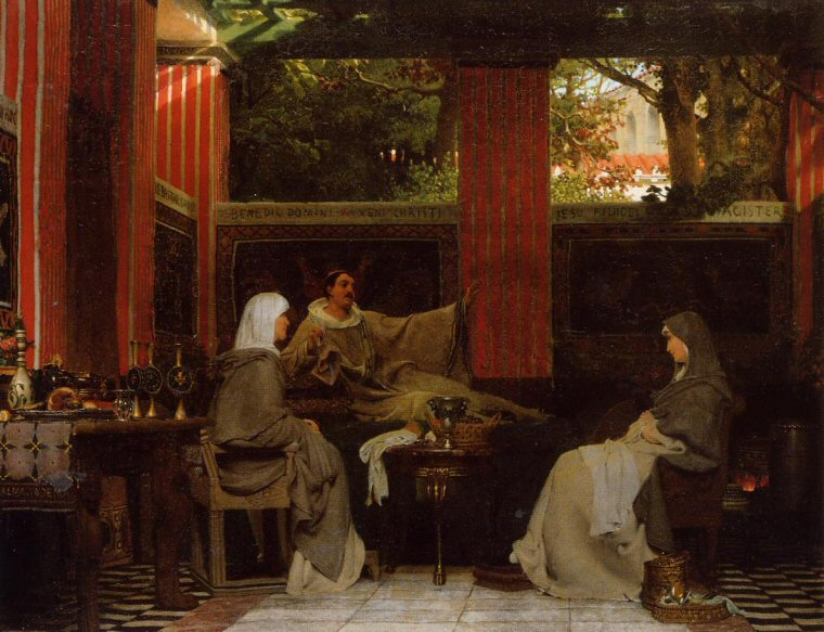 Venantius Fortunatus Reading His Poems to Radegonda VI.